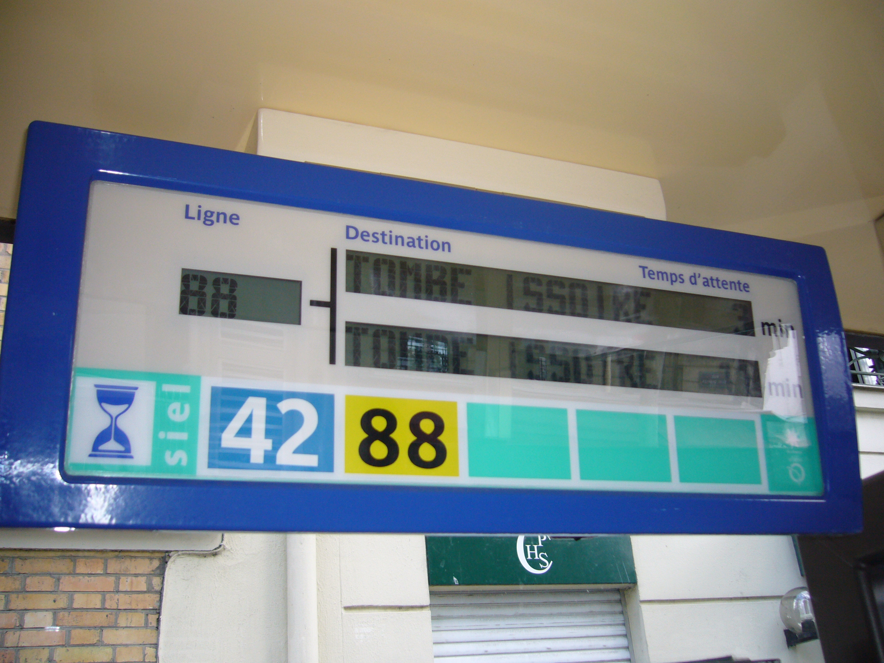 Illustration d'un panneau SIEL bus à l'arrêt des bus 42 et 88 dans le 15ème arrondissement.